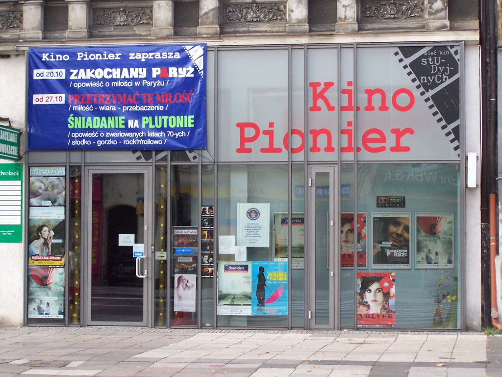 Kino Pionier w Szczecinie